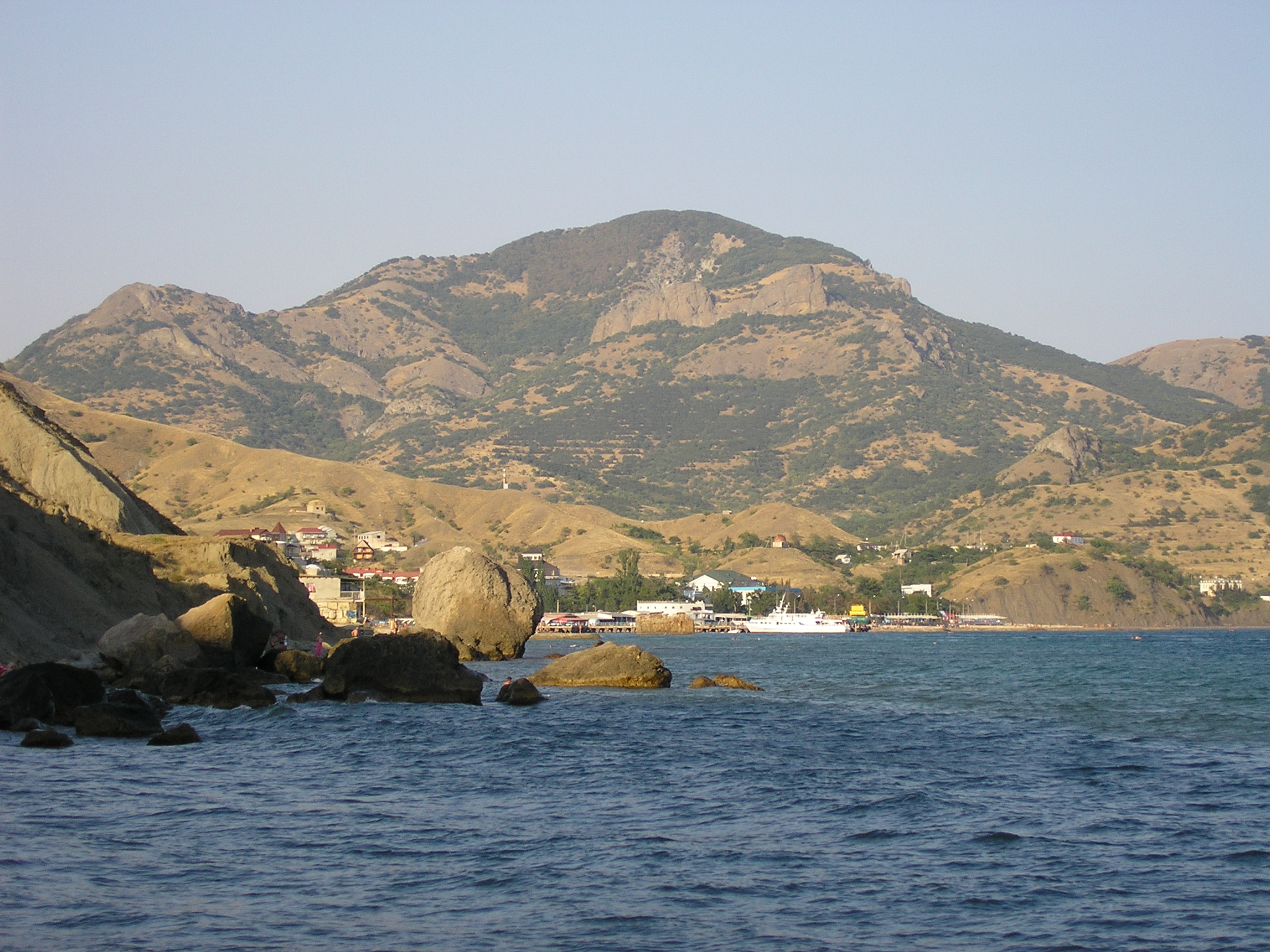 Вид на Кара-Даг со стороны Лисьей Бухты